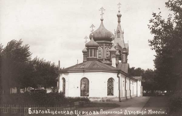 Церковь Благовещения (старая) в Харбине